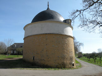 colombier